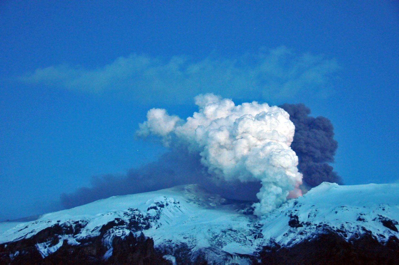 Eyjafjallajökull, Iceland